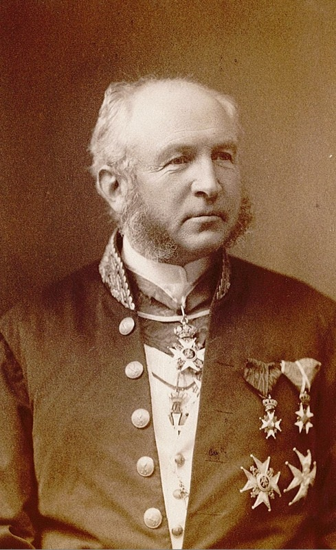 Carsten Tank Nielsen, portrett, mann, telegrafdirektør, uniform, ordener, brystbilde.